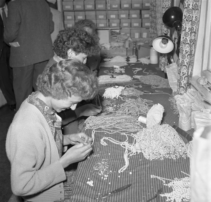 Glasindustrie Emil Zenker, Weidenberg Auffädeln von Perlen zu Perlenketten